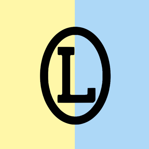 Hierro de la ganadería de Ana Romero